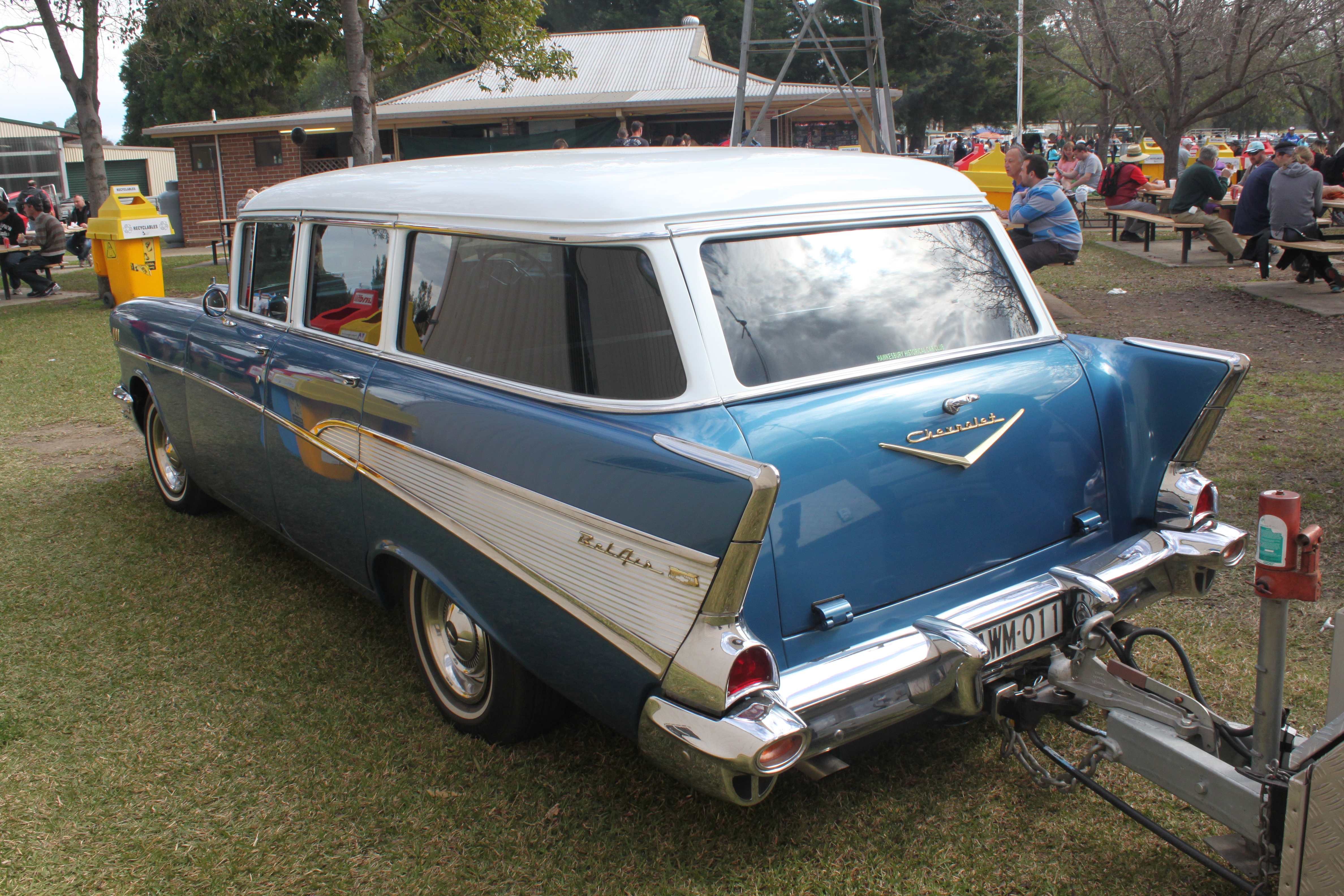 1957 Chevrolet 210 Wagon